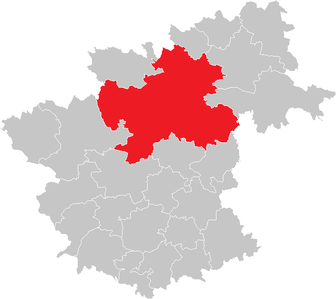 Bezirk Zwettl